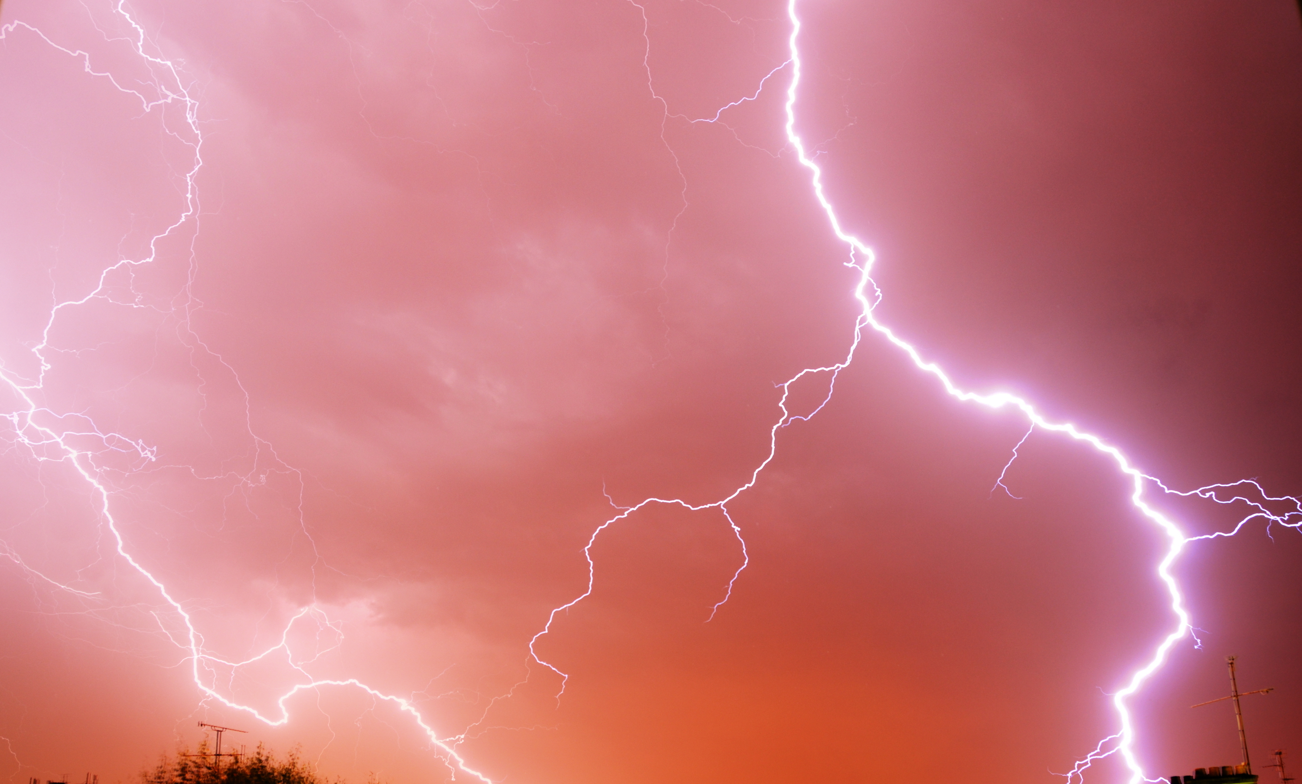 Pose de 90 secondes. Lightnings. 90 seconds exposure.